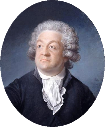 Portrait of Honoré-Gabriel Riqueti, marquis de Mirabeau